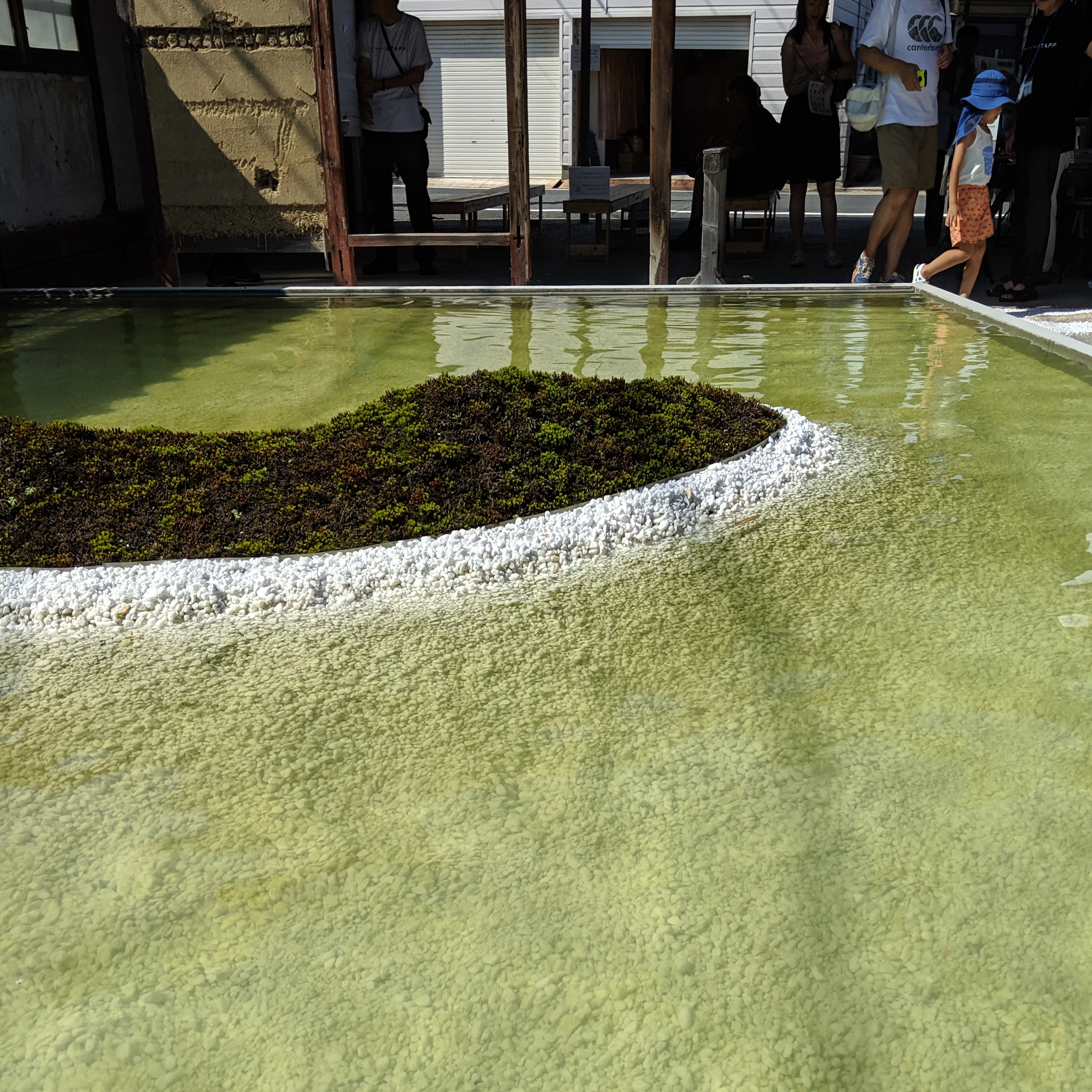 The Naoshima Plan「水」展の水庭